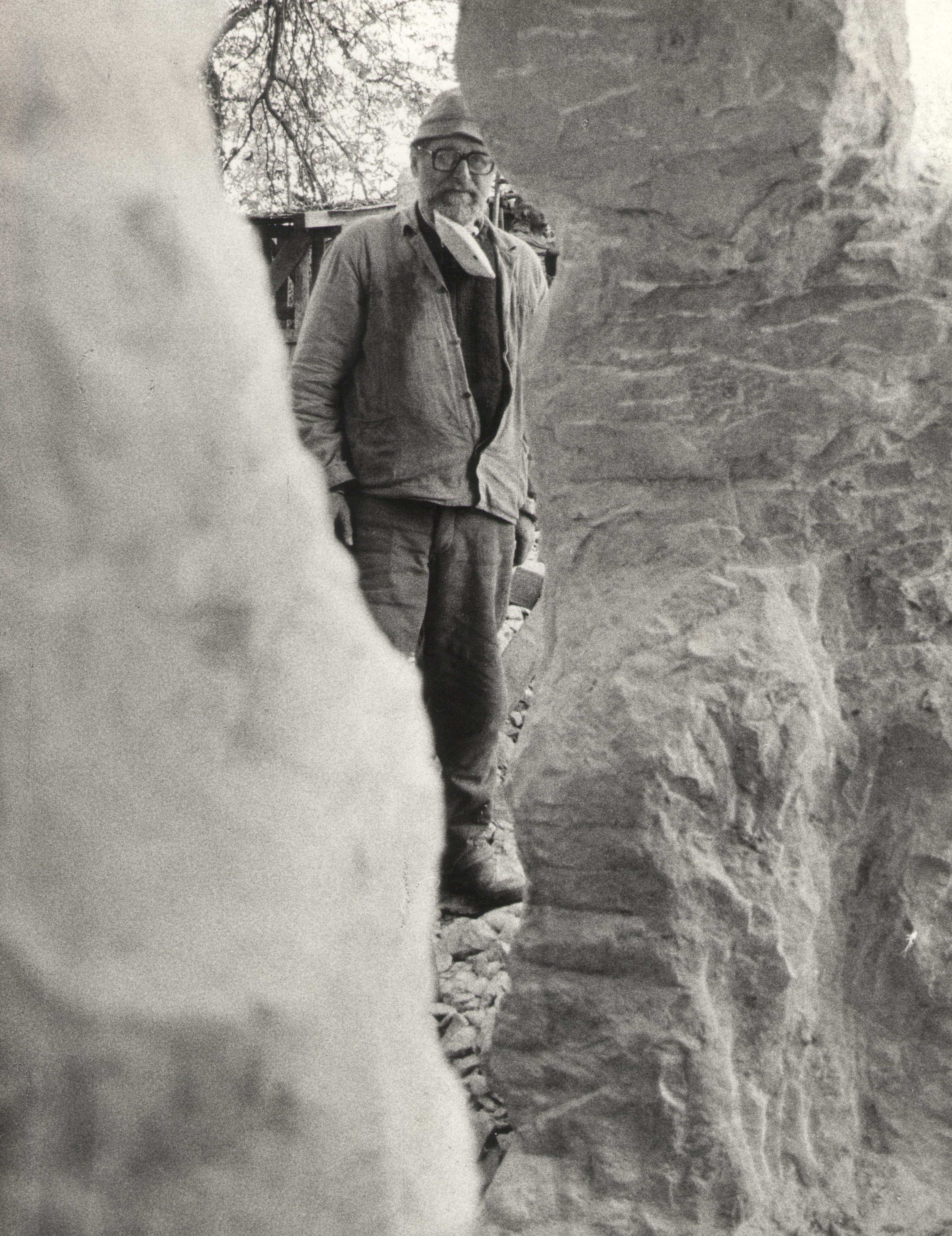 M. J. Černý